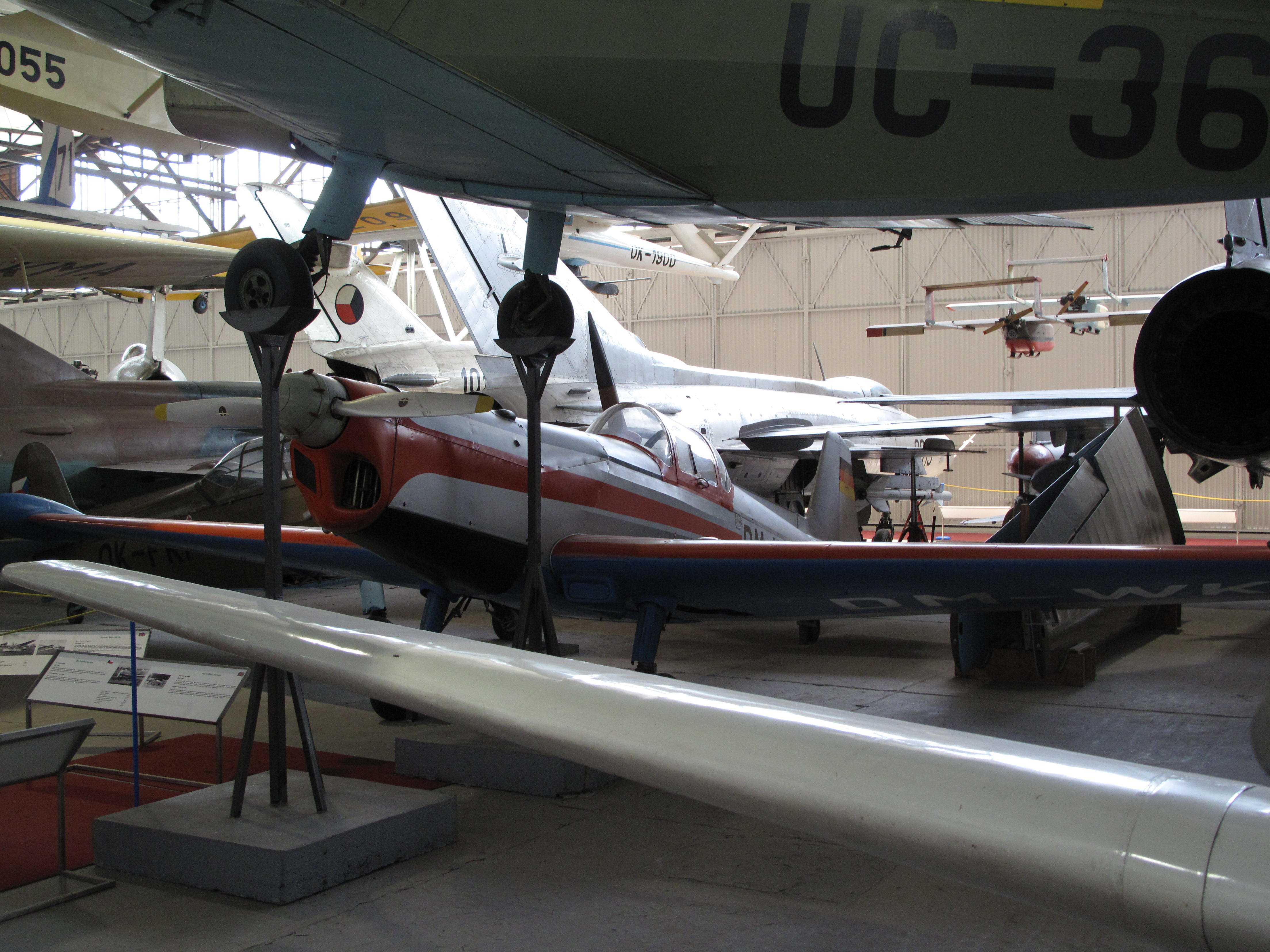 Zlin Z-326; Letecké muzeum Kbely